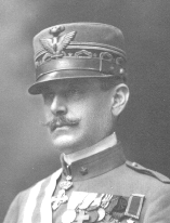 Italian general, politician and minister of the Kingdom of Italy